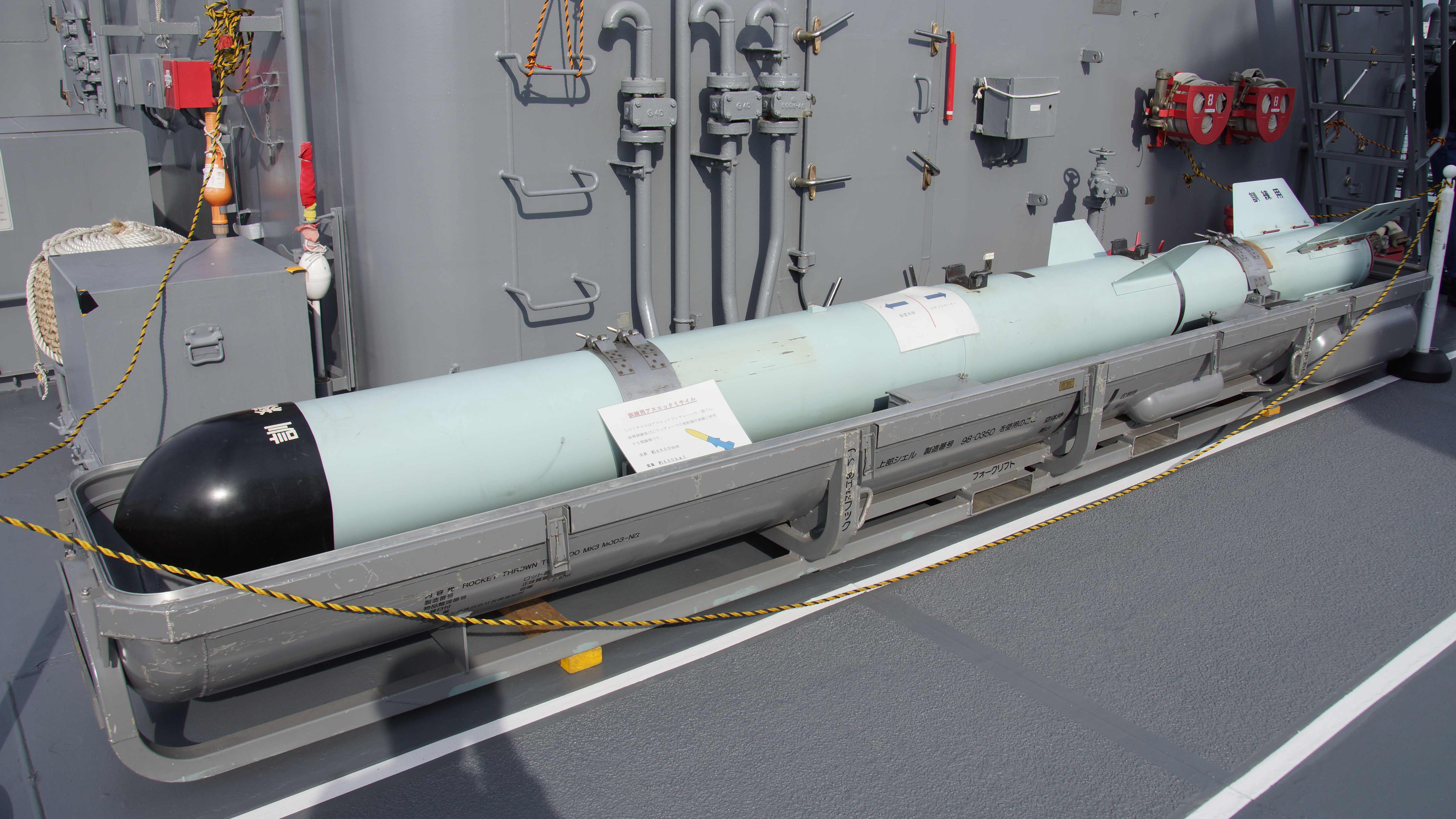 護衛艦しまかぜ（DDG-172）甲板上の訓練用アスロックミサイル 左前面。2017年12月10日 海上自衛隊阪神基地にて。